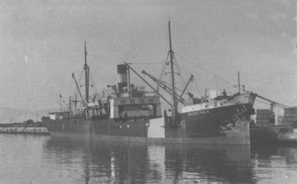 אוניית הרכש מאסטרלה "הזקן"